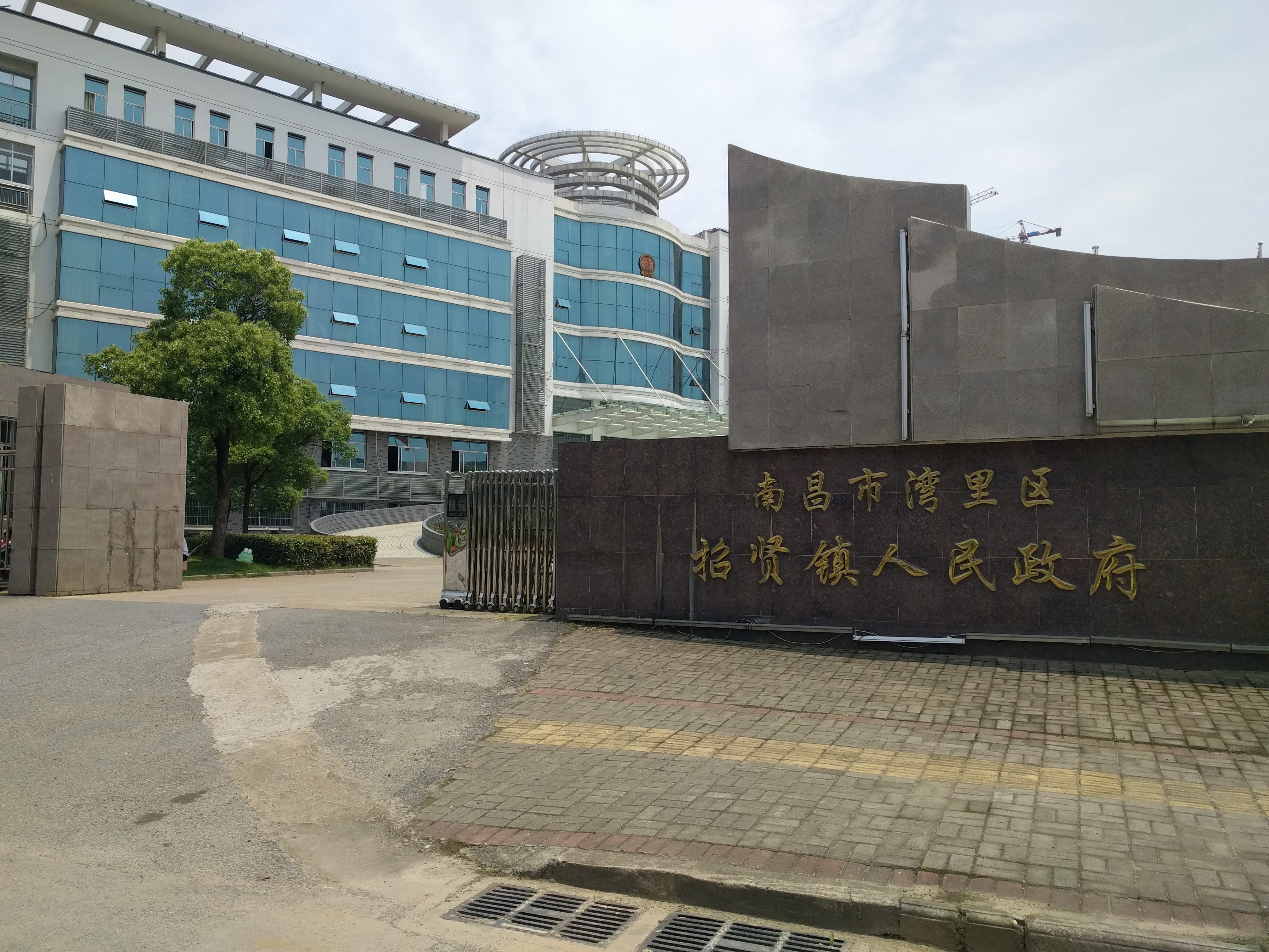 招贤镇政府